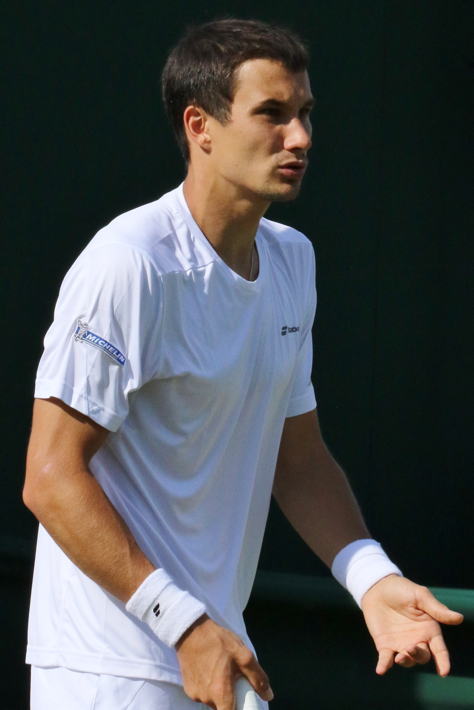 Donskoy WM16 (16)